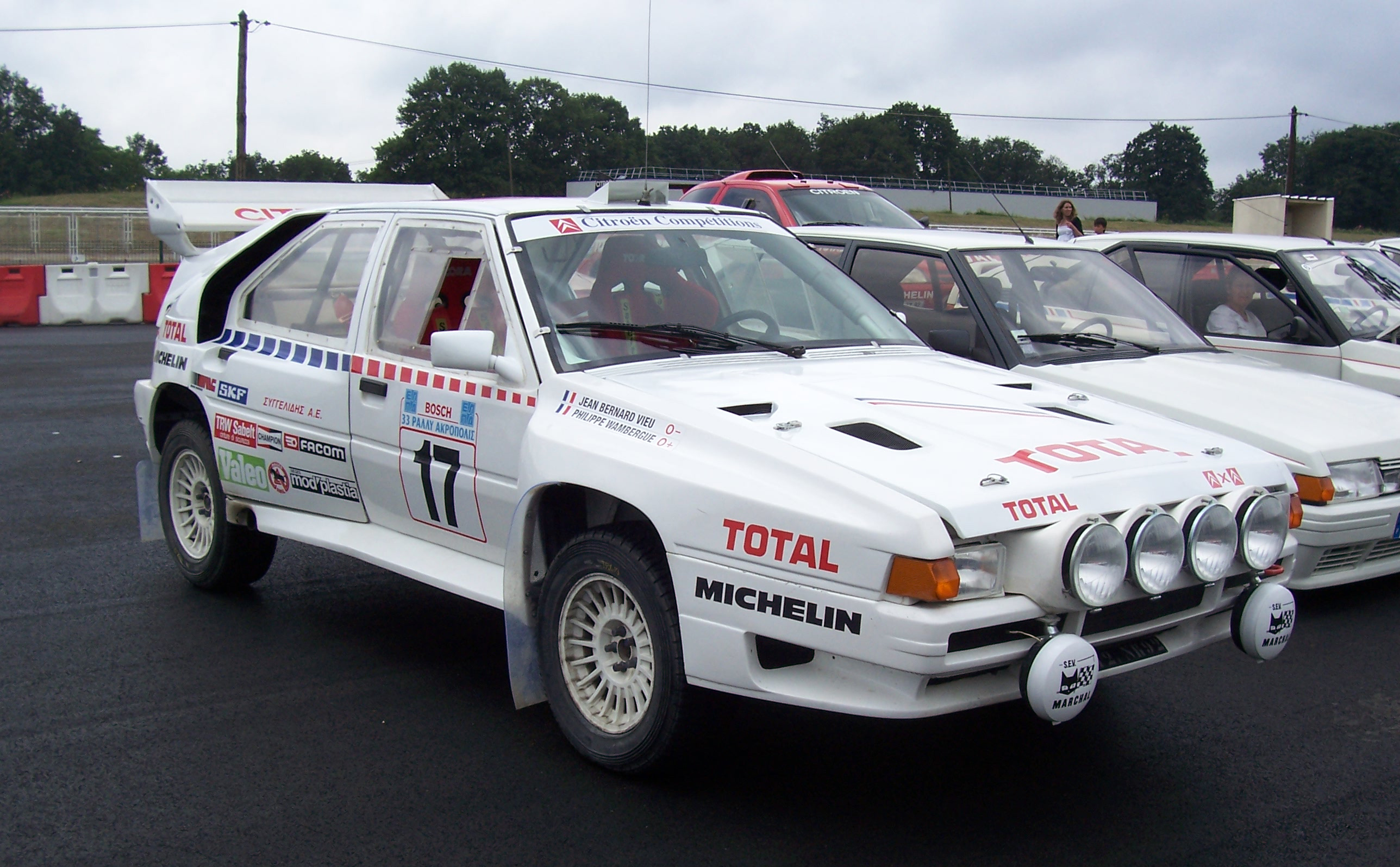 Une rare survivante des 20 exemplaires produits de la BX 4TC Evolution.